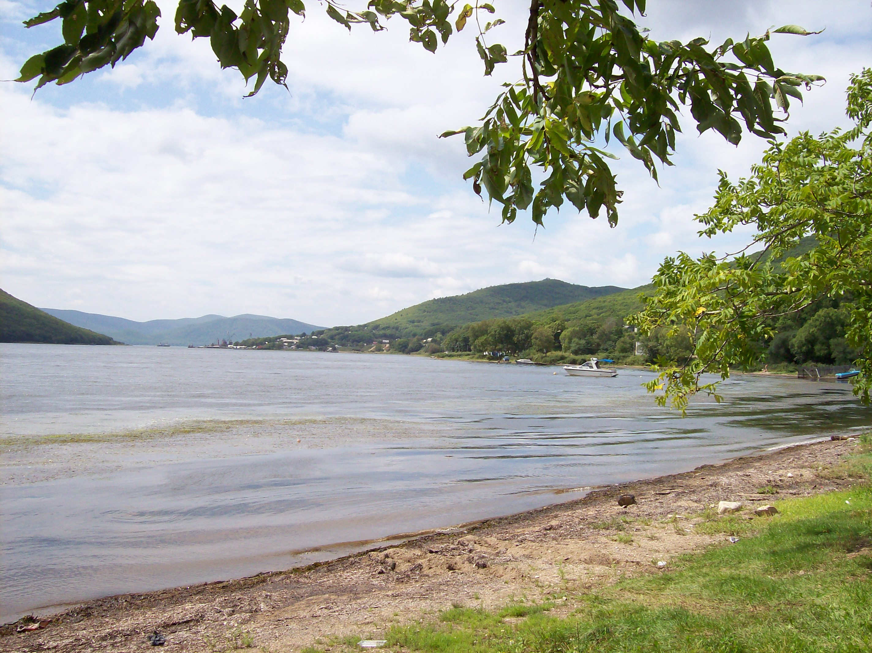 Приморье, Бухта Ольга